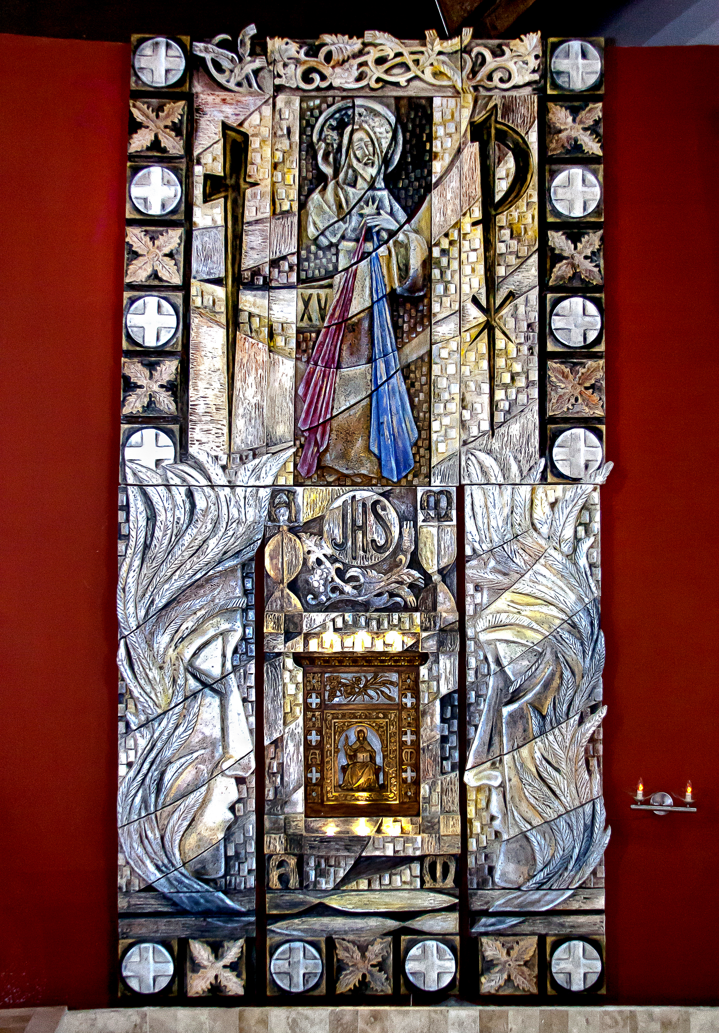 "Sangre, Cuerpo, Alma y Divinidad", retablo religioso creado por Gladys Torres Template:"Sangre, Cuerpo, Alma y Divinidad", retablo created by Gladys Torres